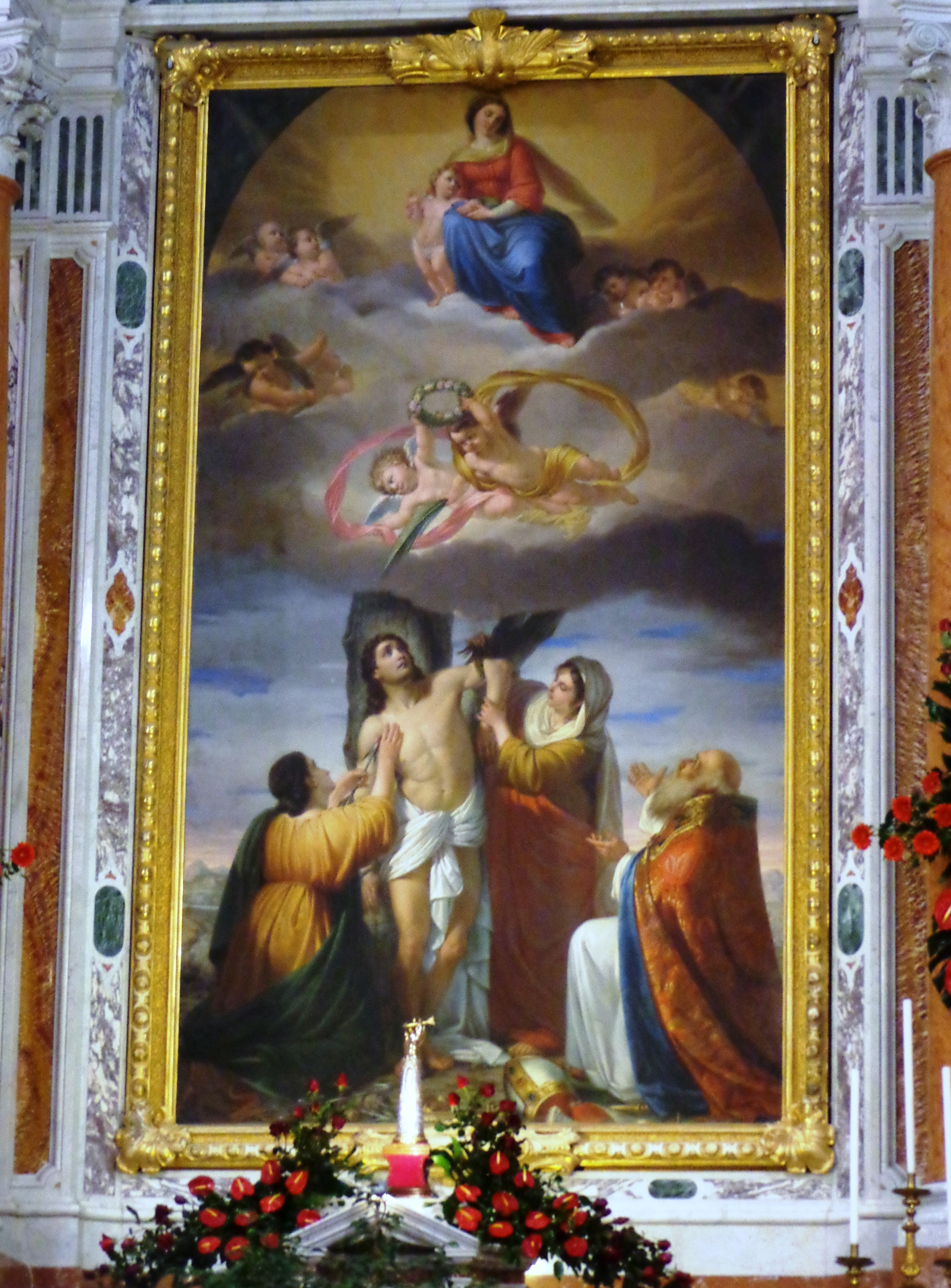 Pala d'Altare Basilica di San Sebastiano Barcellona Pozzo di Gotto.